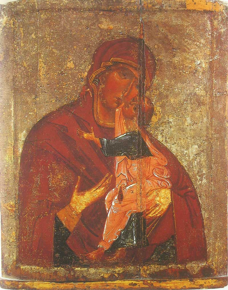 Богоматерь Толгская (так называемая Толгская III) Школа или худ. центр: Ярославль. Ок. 1327 г. 78 × 60 см Государственный Русский Музей, Санкт-Петербург, Россия Инв. ДРЖ 2703